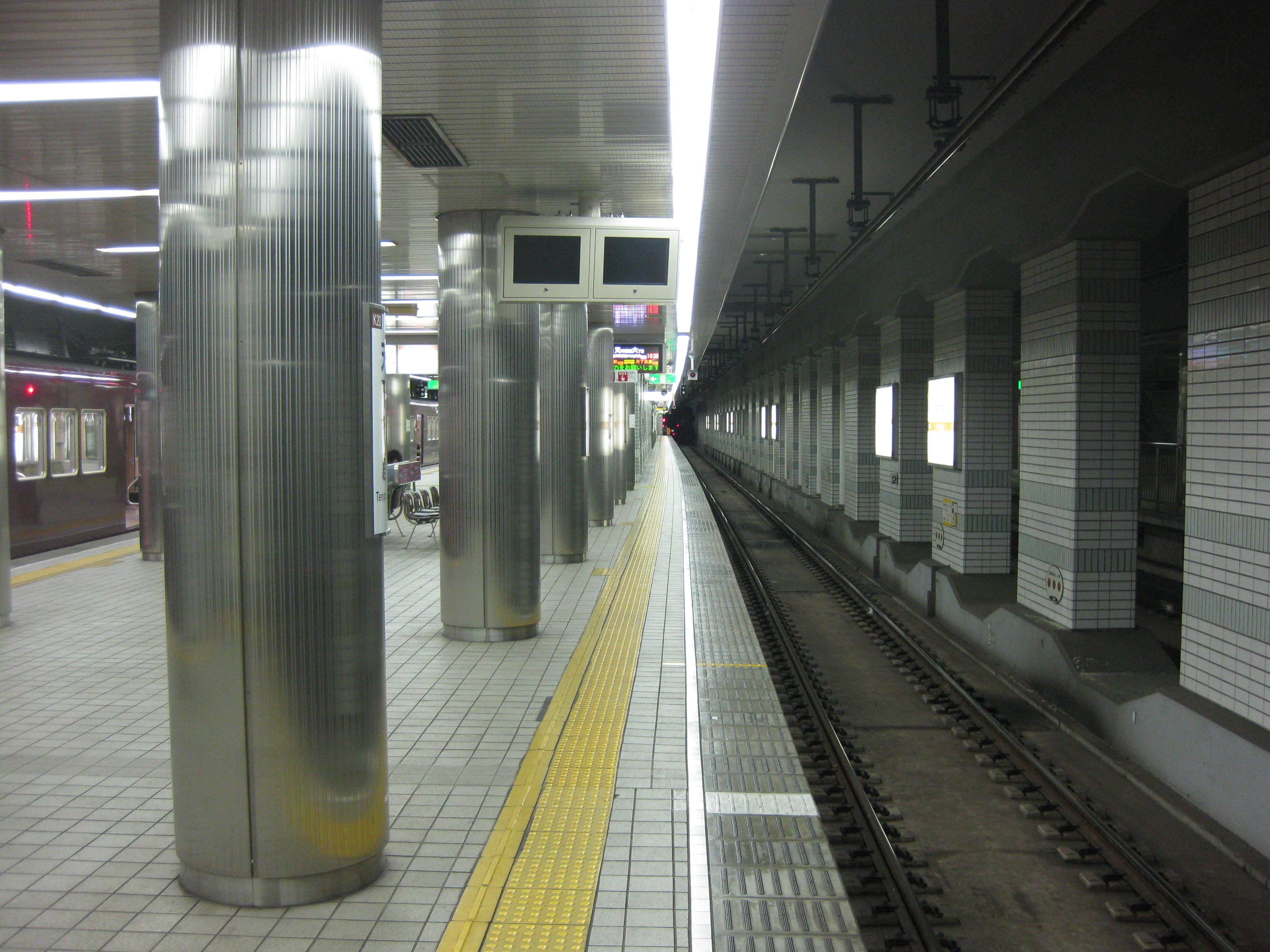 地下鉄堺筋線天下茶屋駅プラットホーム